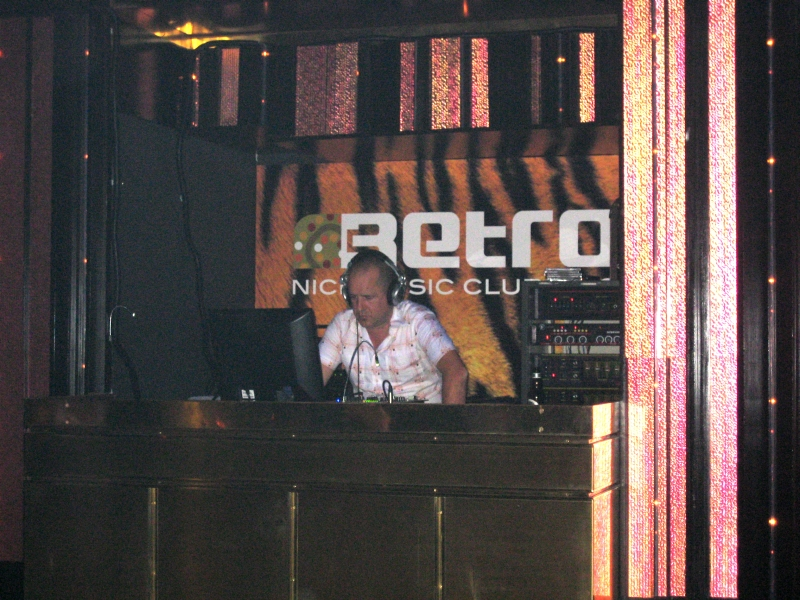 Neno Belan